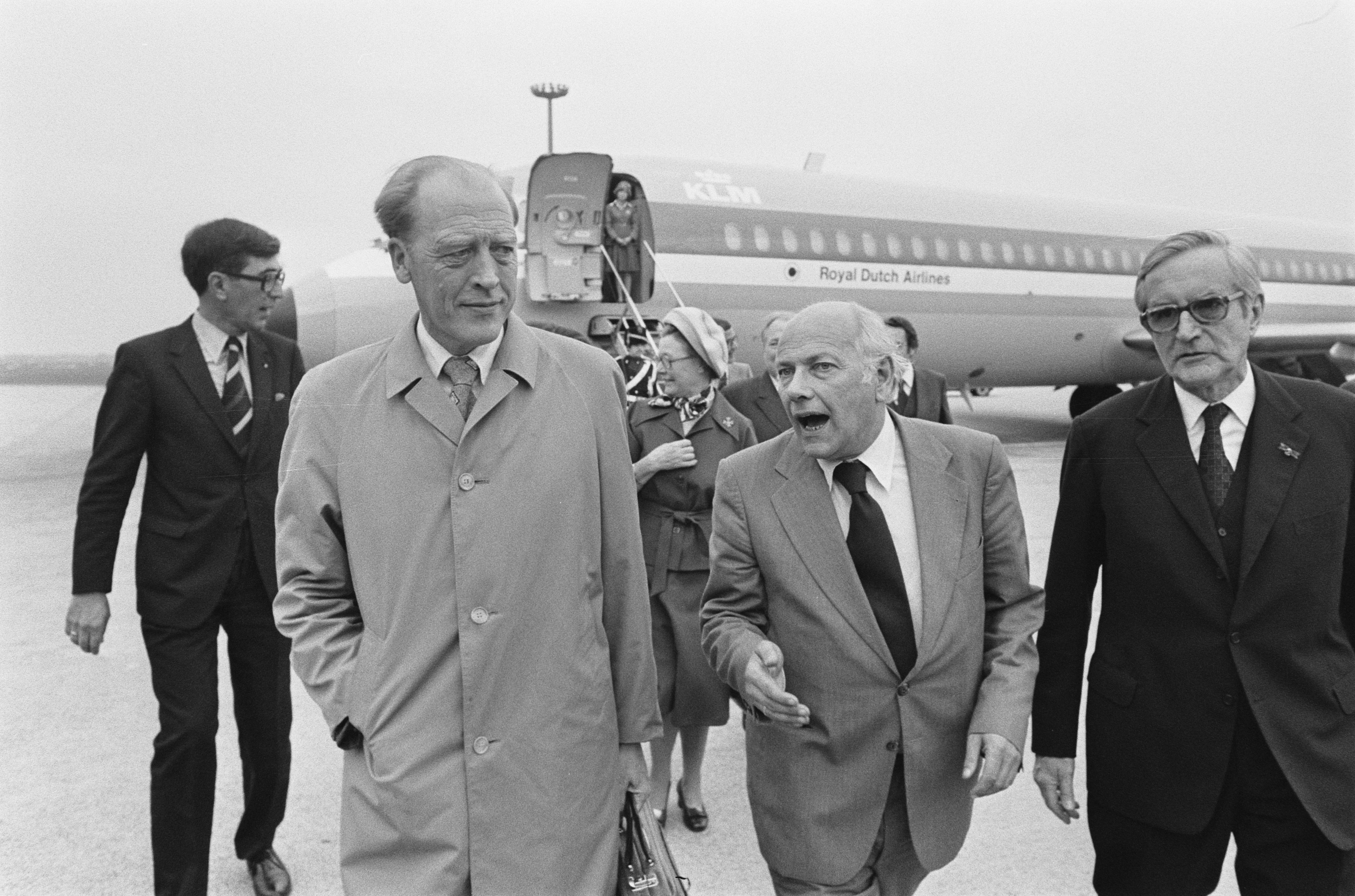 Aankomst Noorse premier Nordli op Schiphol; Den Uyl met Nordli